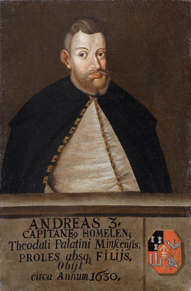 Беларуская (тарашкевіца): Партрэт Андрэя Сапегі (Andrej Sapieha) гербу «Ліс», дзяржаўнага дзеяча Вялікага Княства Літоўскага, старосты гомельскага.